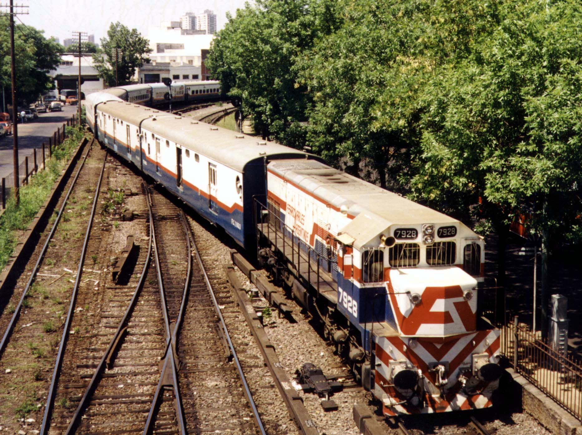 Tren Gran Capitán de Ferrocarriles Argentinos saliendo de Federico Lacroze hacia Posadas. Año 1990.7928-1 Federico Lacroze W